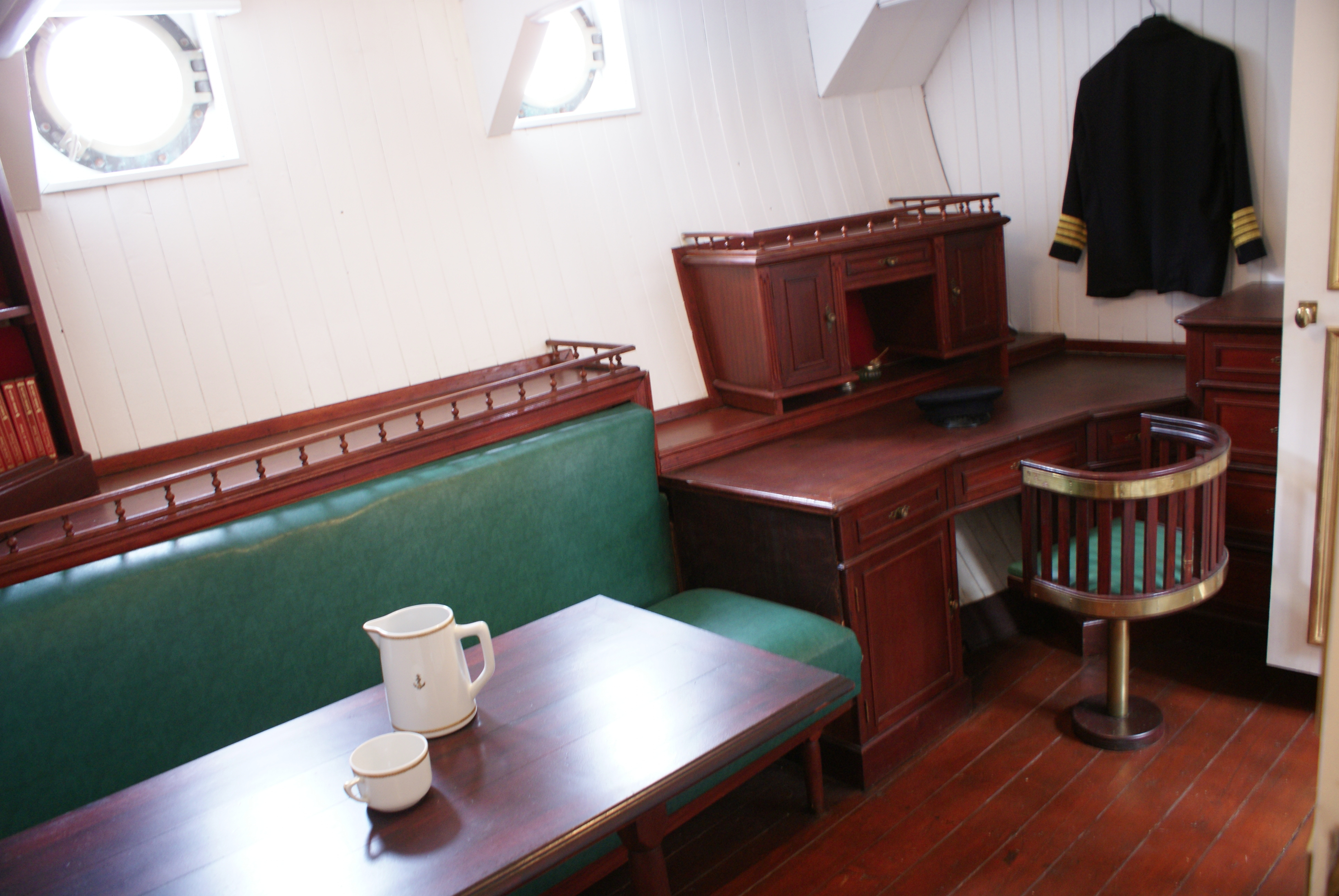 Bureau du commandant du trois-mâts carré Duchesse Anne (Musée portuaire de Dunkerque, Nord, France).